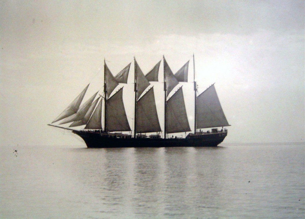 Yacht Flying Cloud in navigazione alla vela, 1927 (AS Livorno, Archivio storico del Cantiere navale Luigi Orlando)